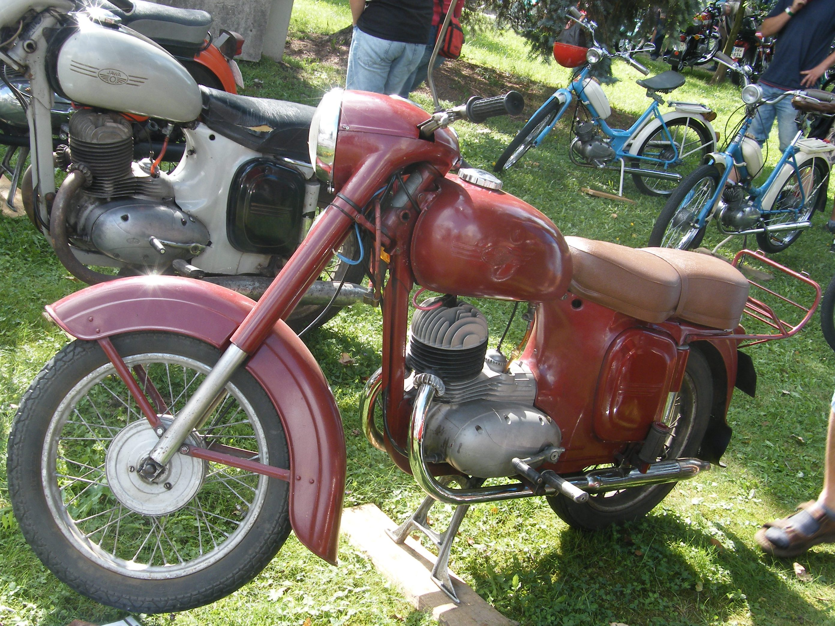 Jawa-ČZ 175 ccm type 356 (1959)